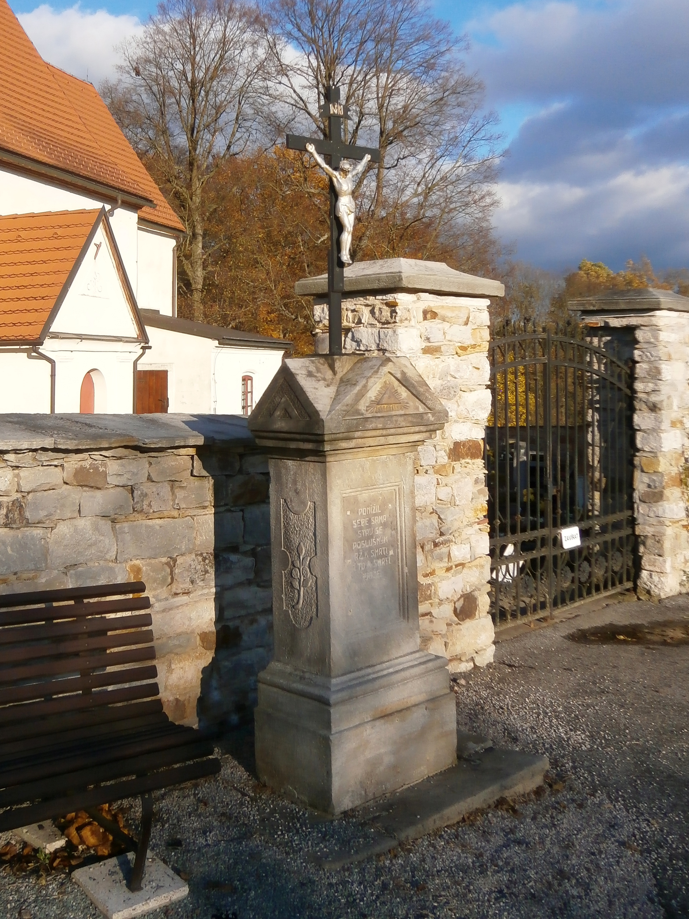 Kříž u kostela (Boušín)